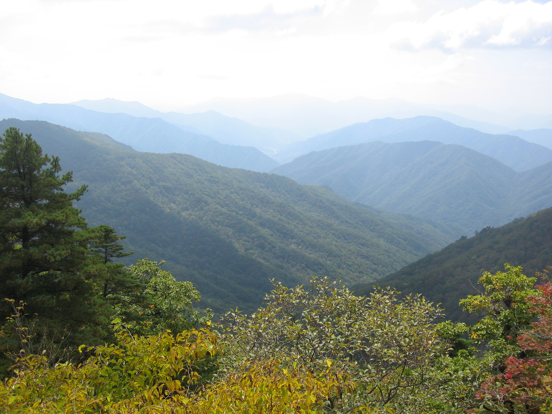 2006년 대한민국 지리산의 모습 The scenery of Jirisan, in South Korea, 2006